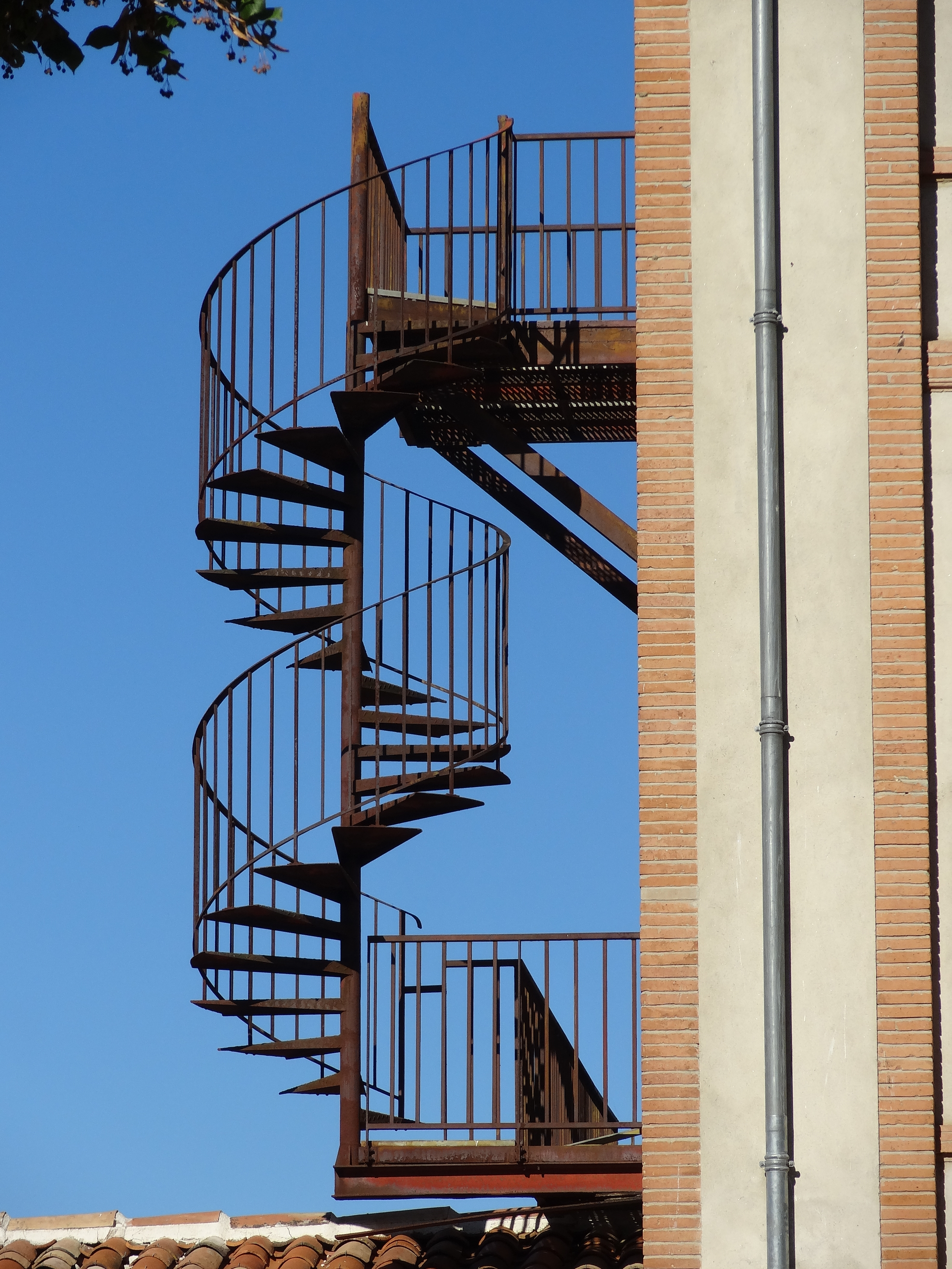 Centre hospitalier Gérard Marchant, à Toulouse, fortement endommagé par l'explosion de l'usine AZF en septembre 2001 .